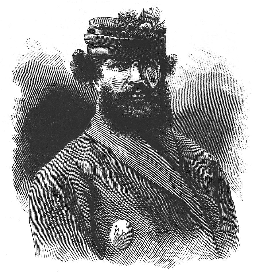 «Ямщик»